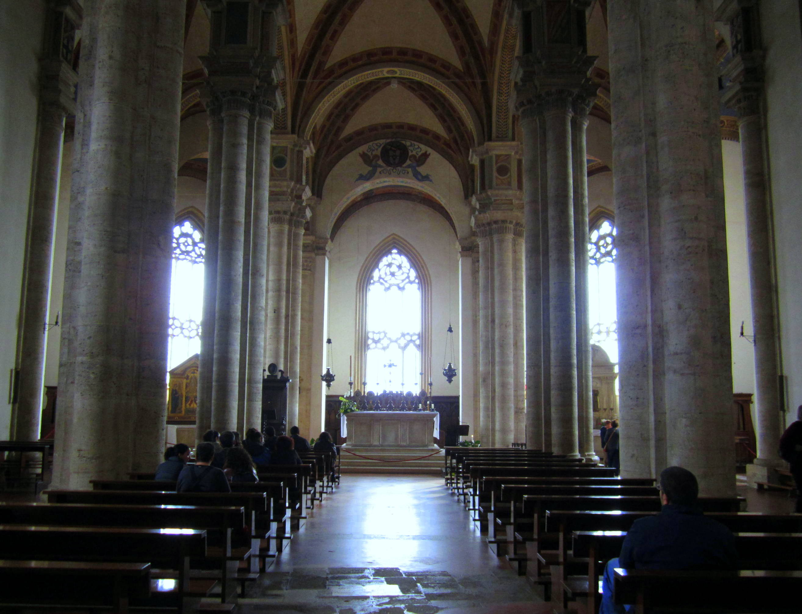 Interno del Duomo di Pienza